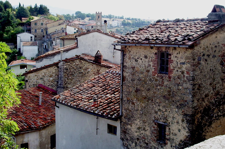 Scorcio panoramico di Cana (GR)